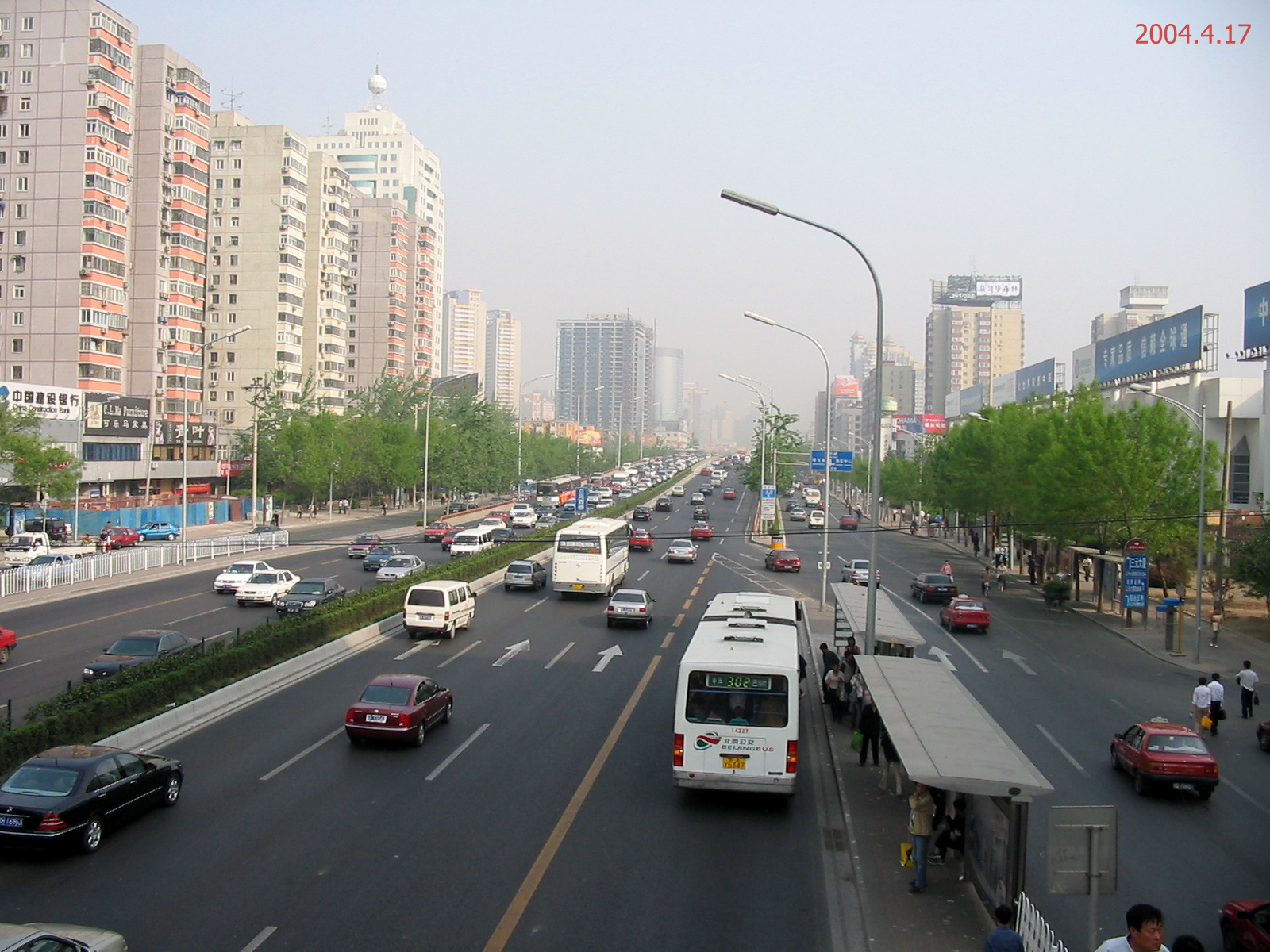 静安庄